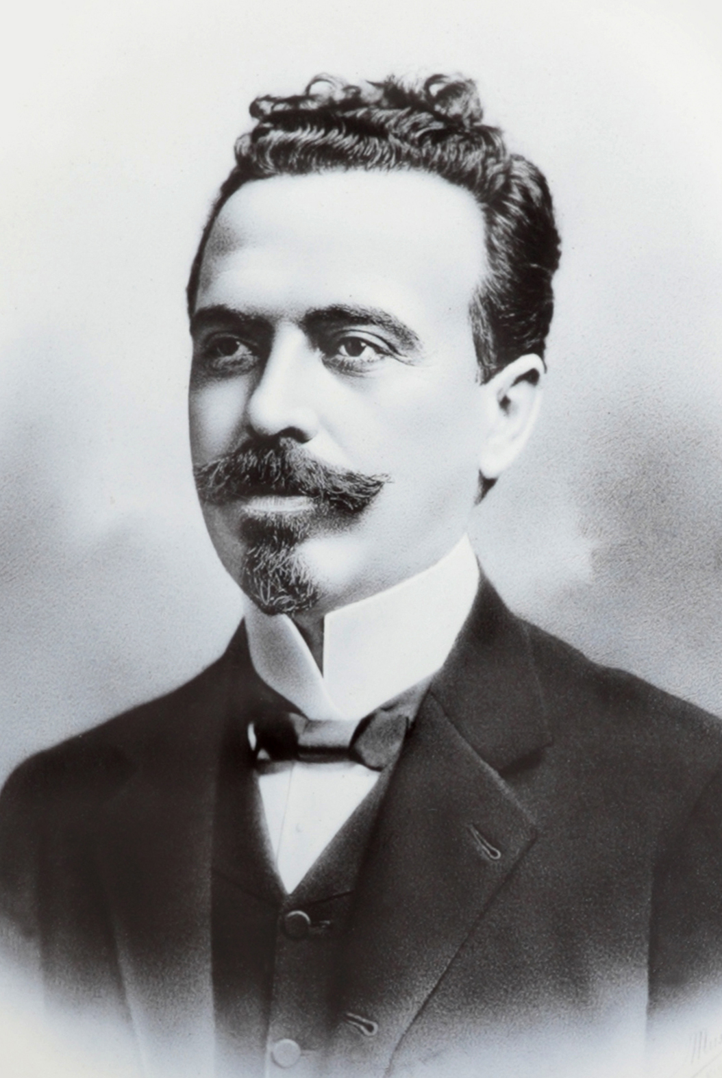 Foto oficial de Nilo Peçanha, presidente do Brasil entre 1909 e 1910.